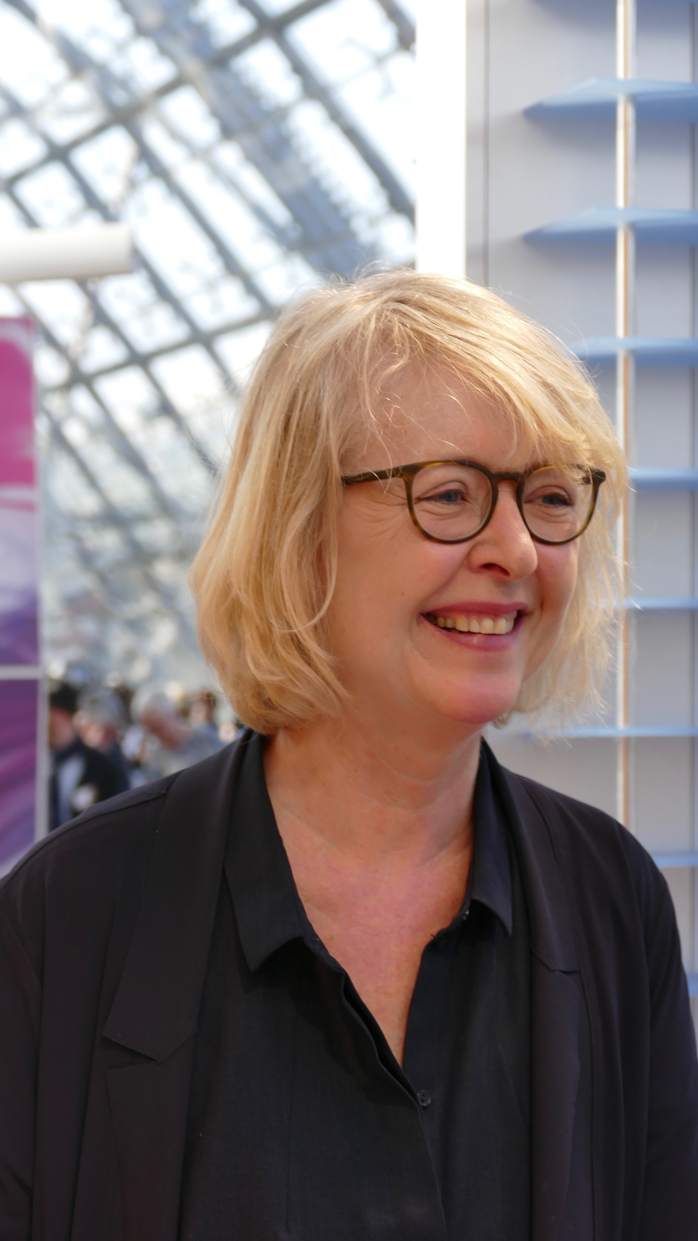 Meike Winnemuth auf der Leipziger Buchmesse 2019. Signieren nach der Vorstellung ihres Buches "Bin im Garten. Ein Jahr wachsen und wachsen lassen".